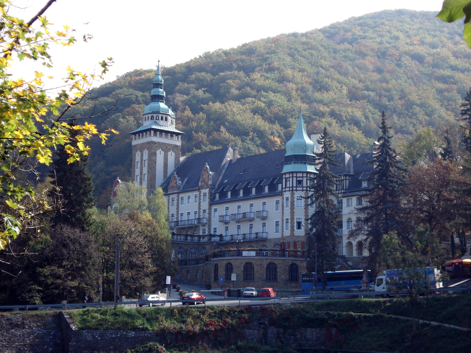 Palotaszálló (Miskolc, Miskolc-Lillafüred) This is a photo of a monument in Hungary. Identifier: 12378